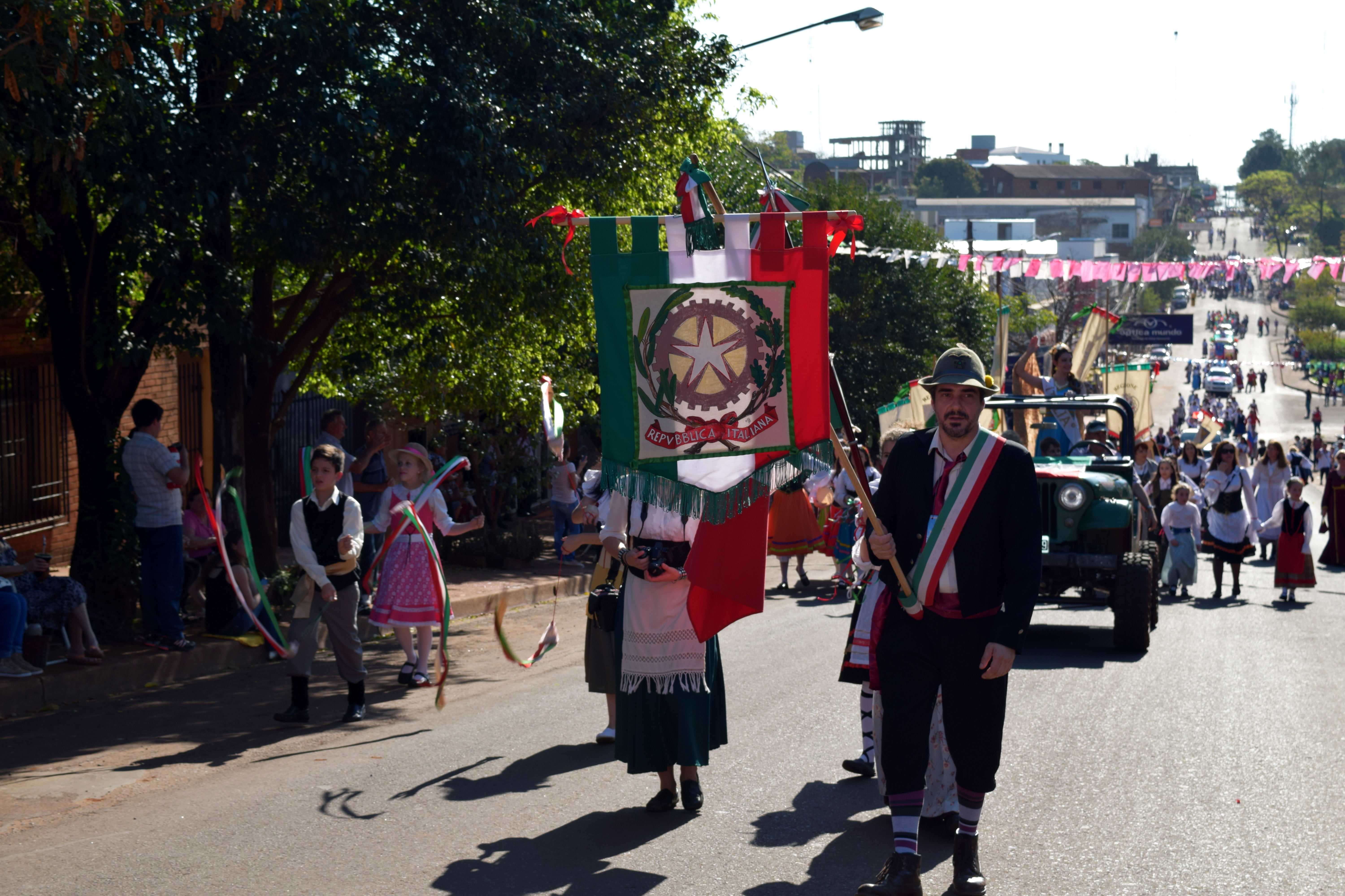 Desfile inaugural de la XXXV Fiesta Nacional del Inmigrante realizada en Septiembre de 2014 en Oberá, provincia de Misiones, Argentina.